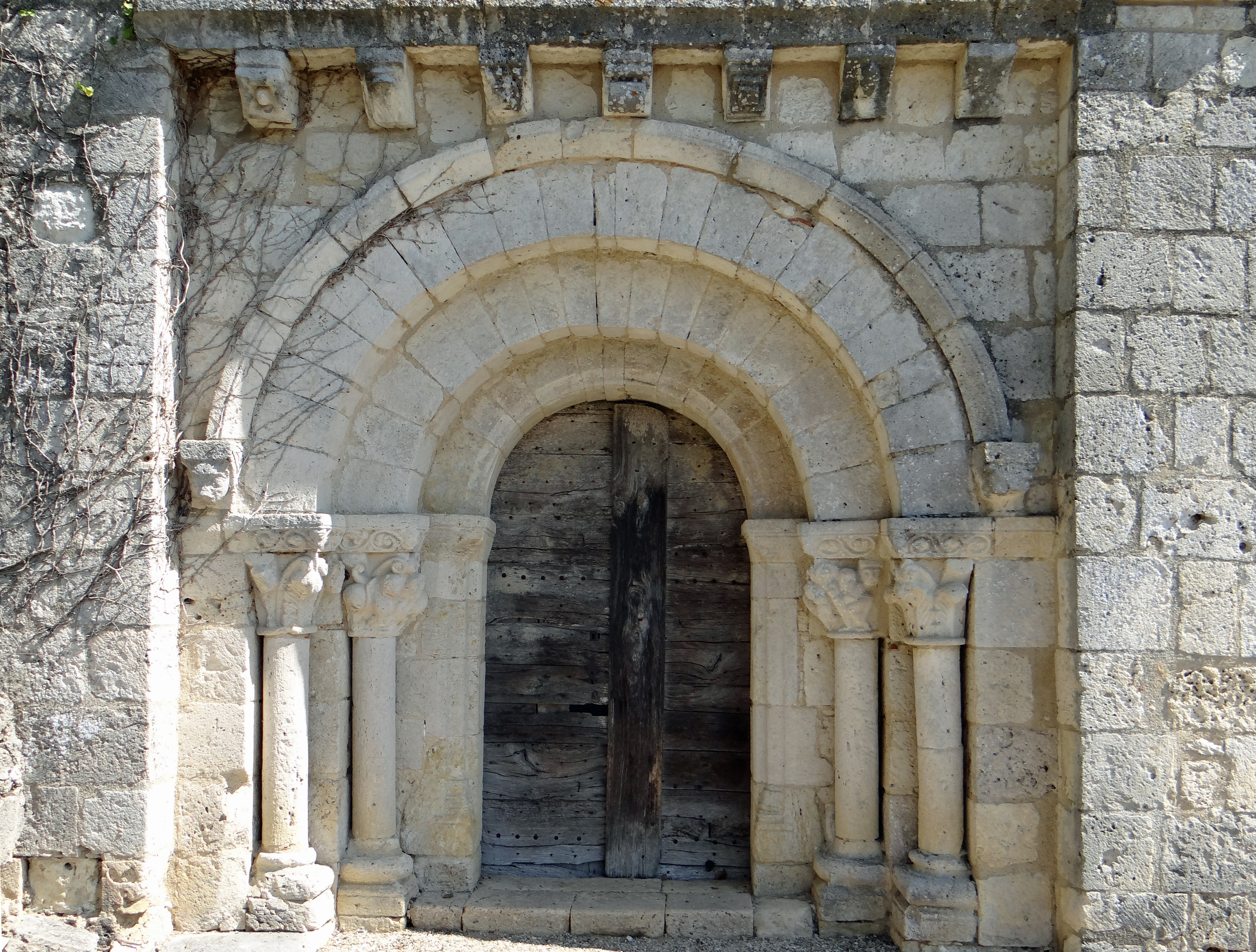 Sainte-Colombe-en-Bruilhois - Église Saint-Martin de Mourrens - Portail sud .